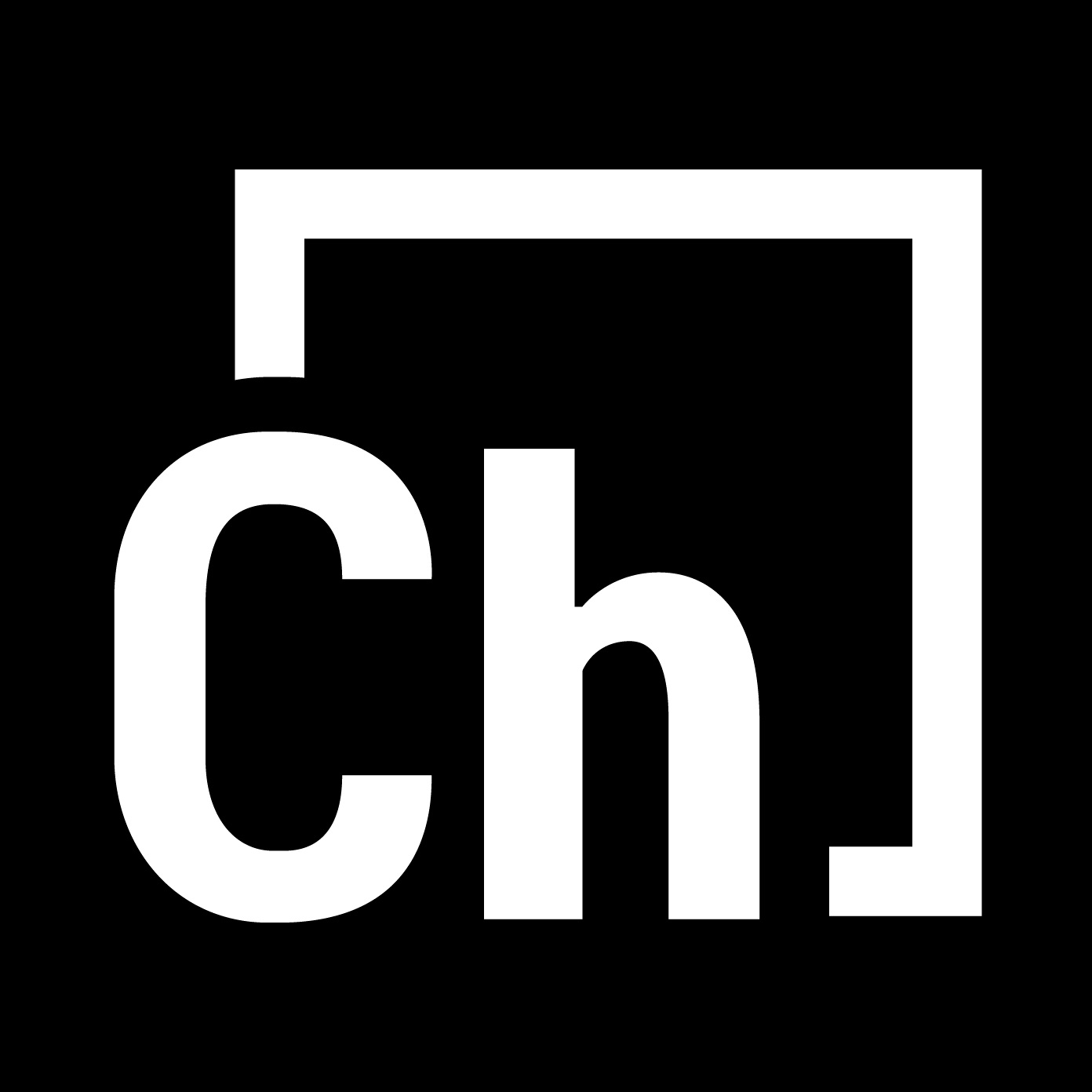 Чердак